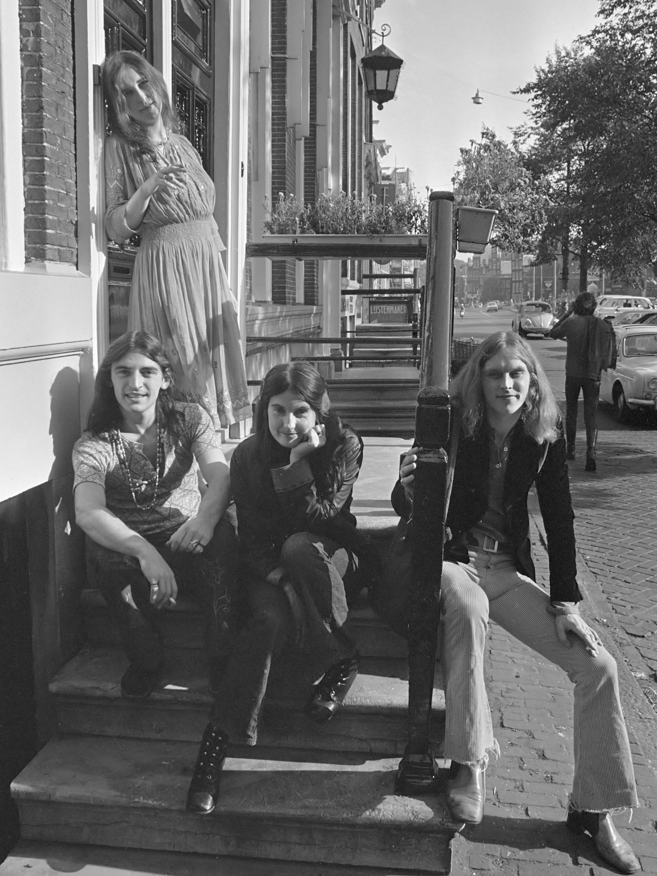 Engelse popgroep Incredible Stringband in Amsterdam 25 september 1970